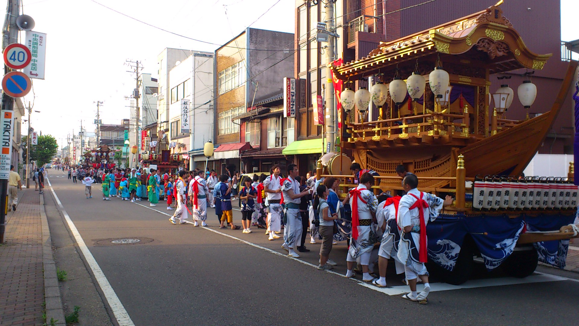 上越まつりで御饌米奉納を待つ屋台